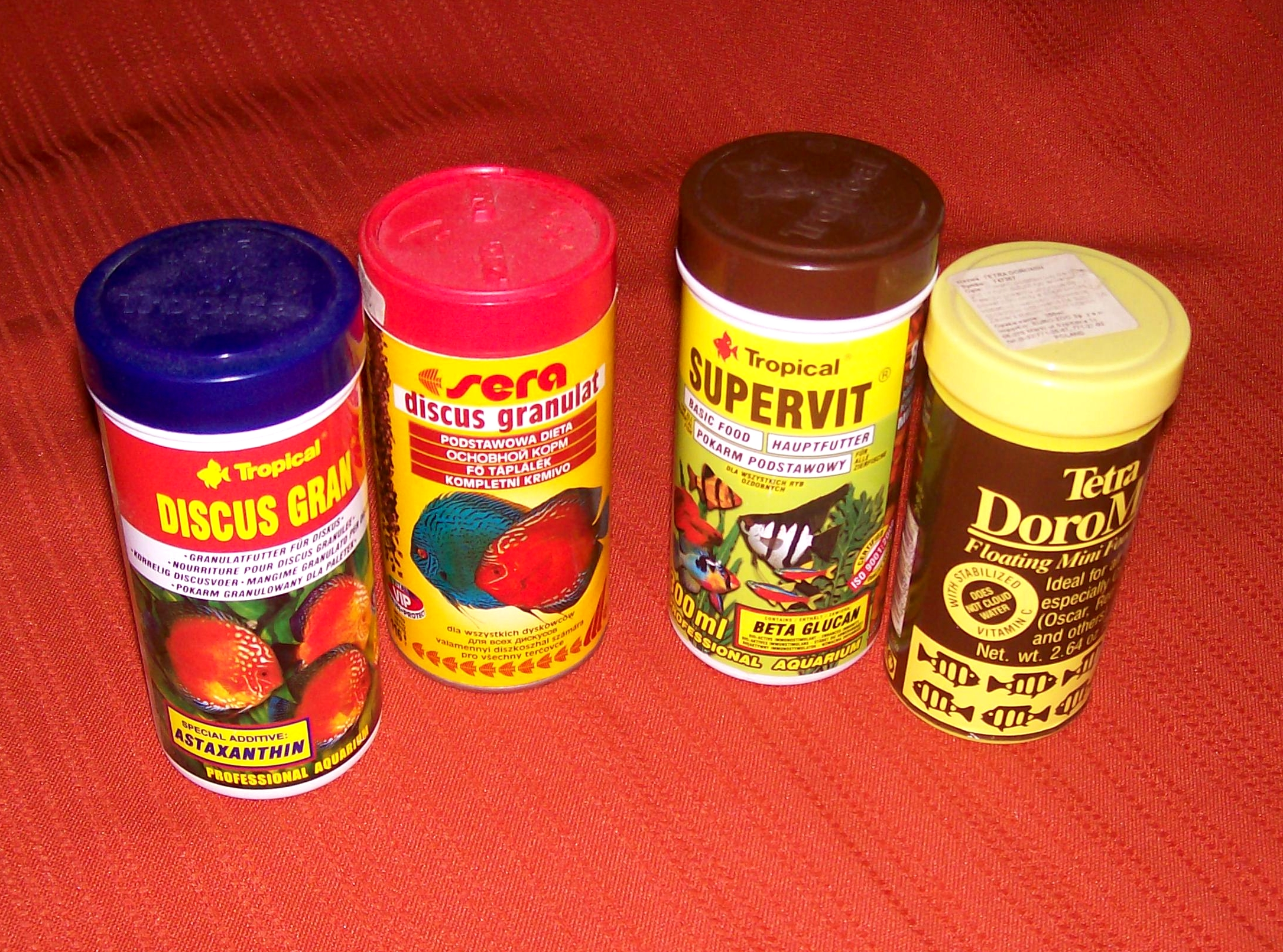 Description:Sztuczny pokarm dla ryb akwariowych. Author:Ewkaa